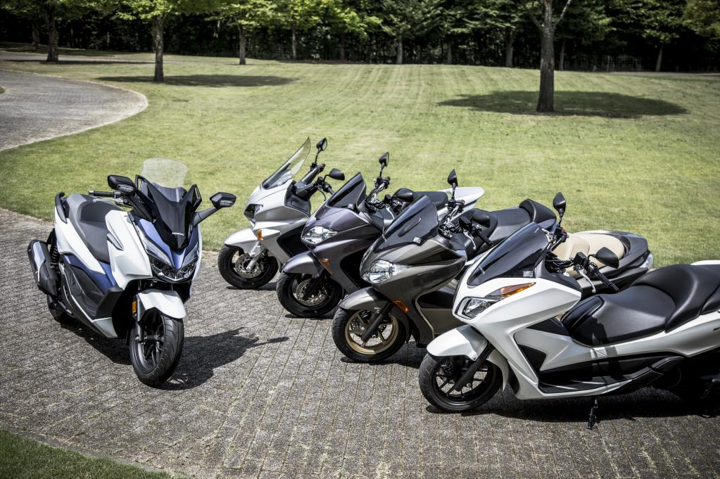 歴代フォルツァ